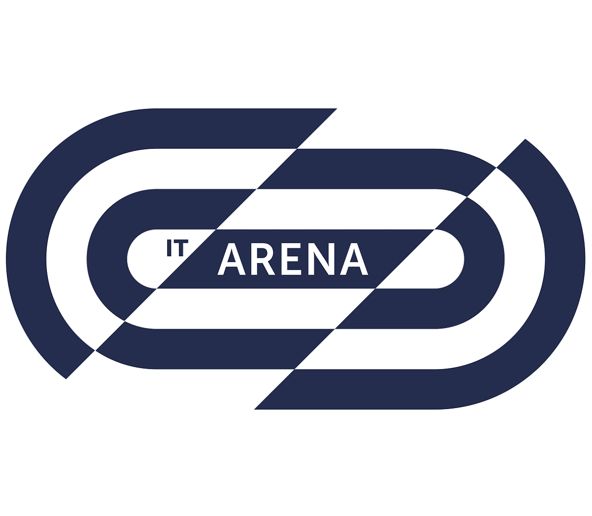 Imatge del logotip de l'esdeveniment "It arena".